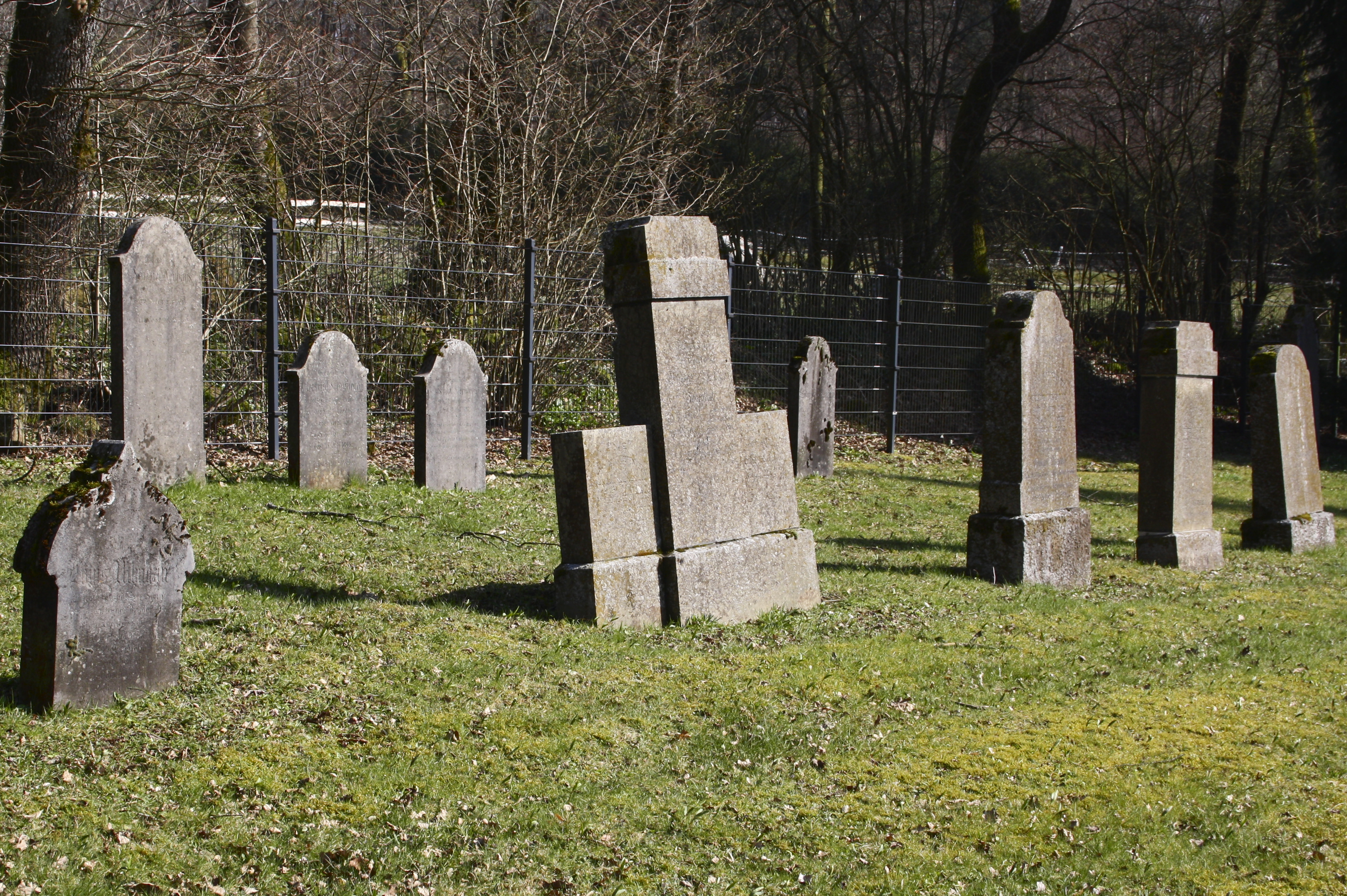 Jüdischer Friedhof, Westerburg, Westerwaldkreis, Rheinland-Pfalz, Deutschland